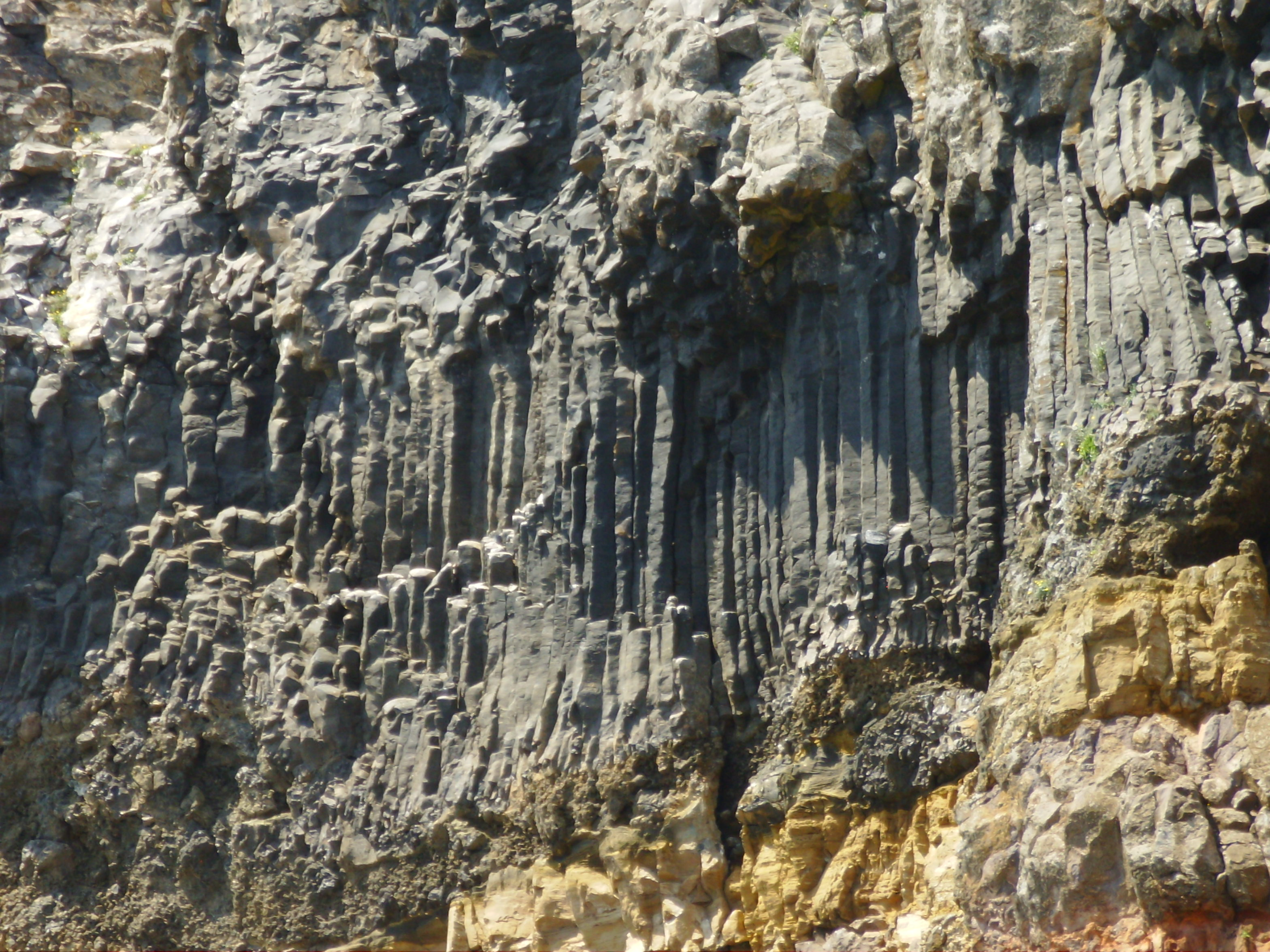 Formação geológica da Ilha de Santa Maria (Açores), Portugal: disjunção prismática (basalto) na ponta do Castelo.